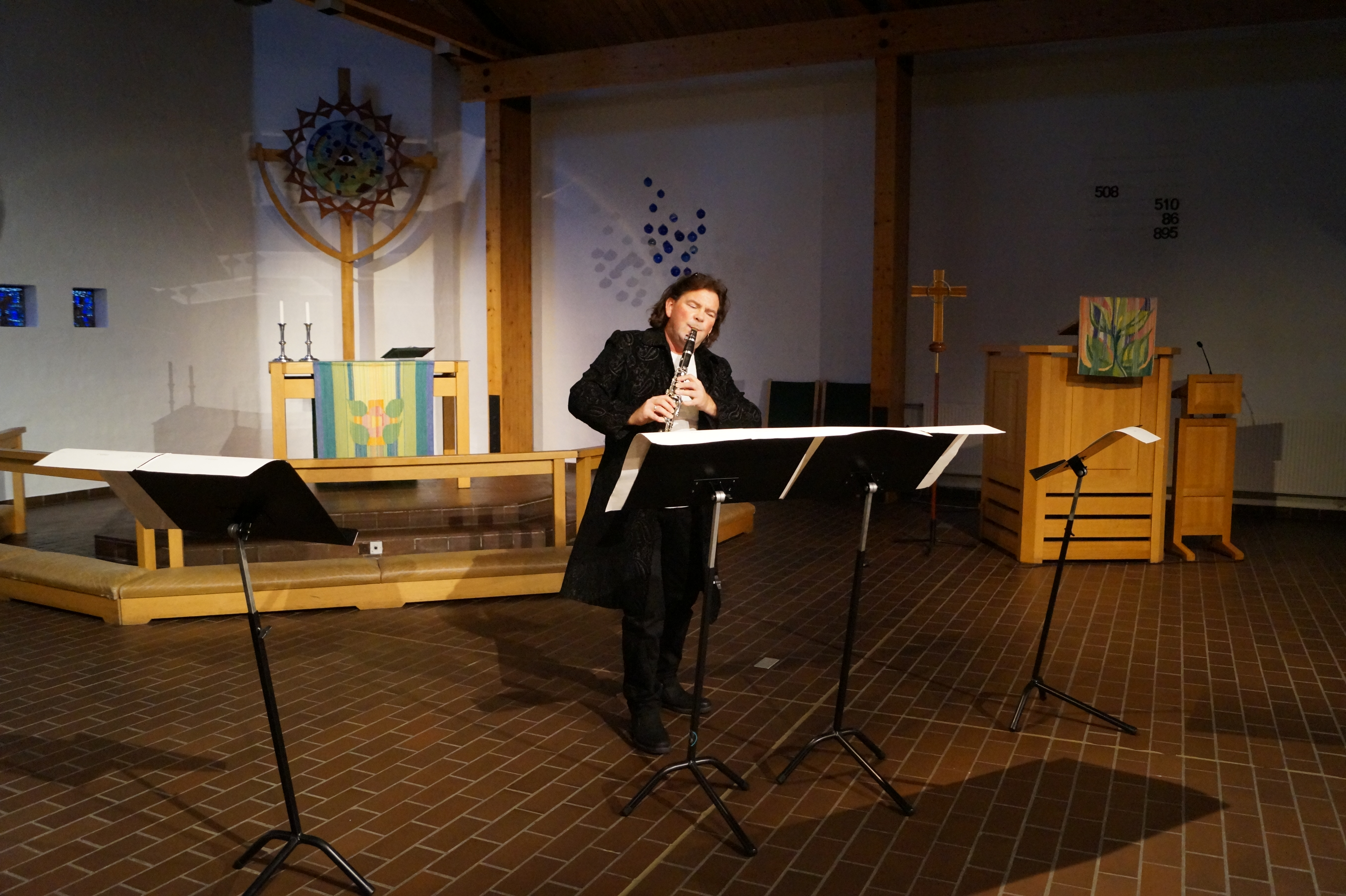 Privat bilde fra Bugården kirke november 2019.